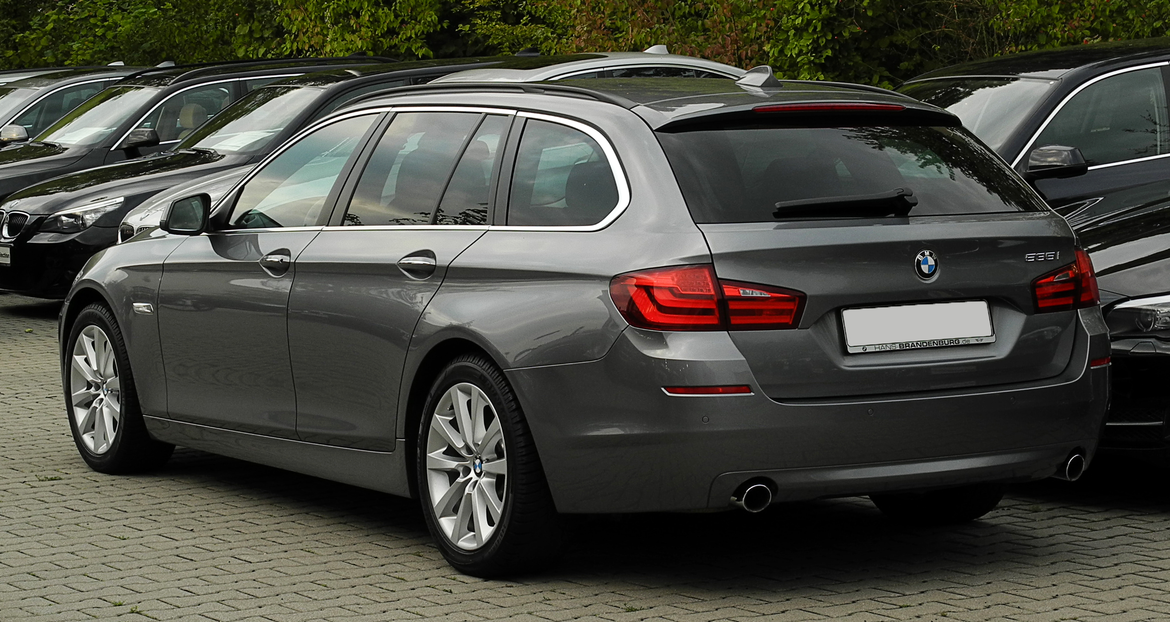 BMW 535i Touring (F11)